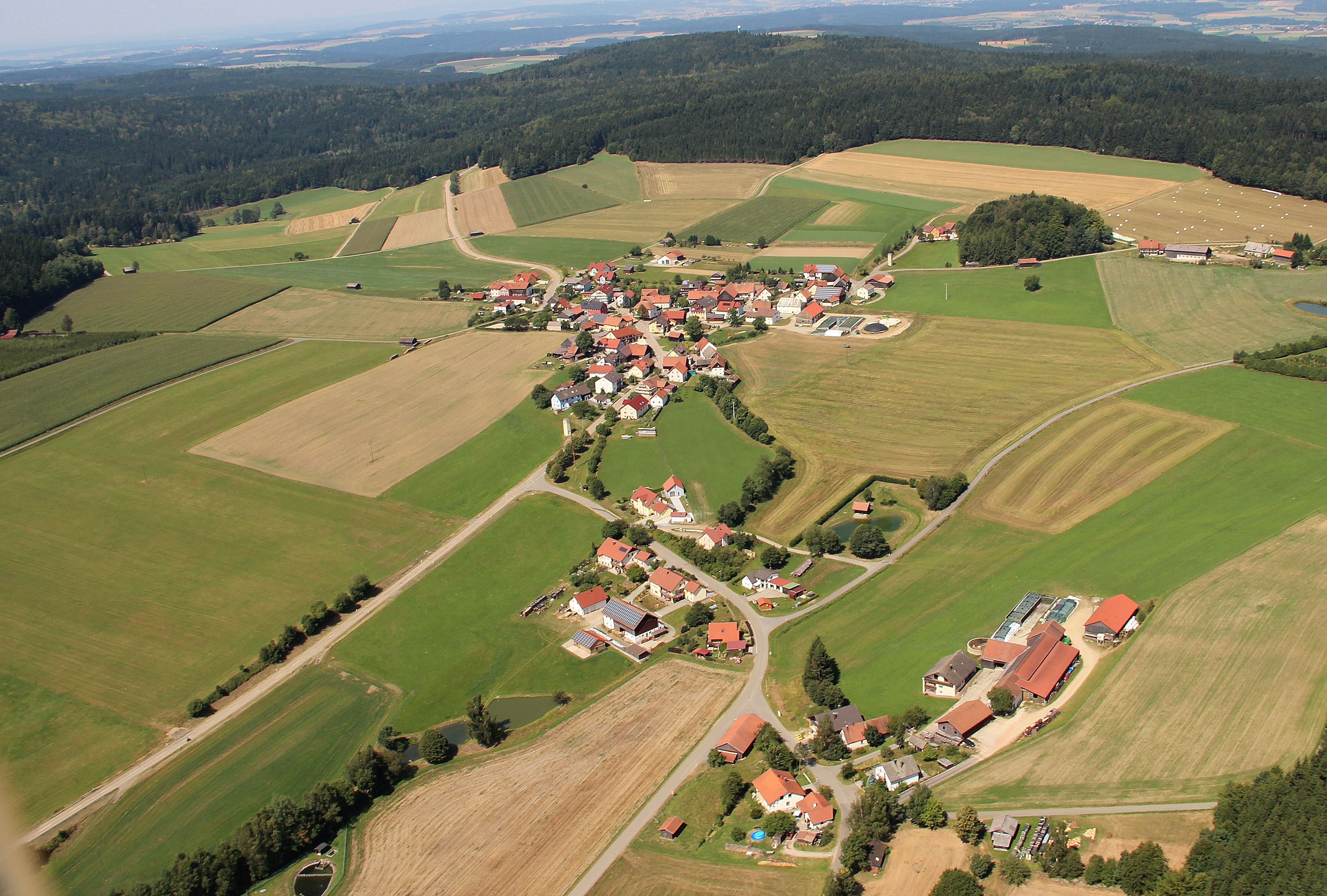 Wildstein, Gemeinde Teunz, Landkreis Schwandorf, Oberpfalz, Bayern (2012)